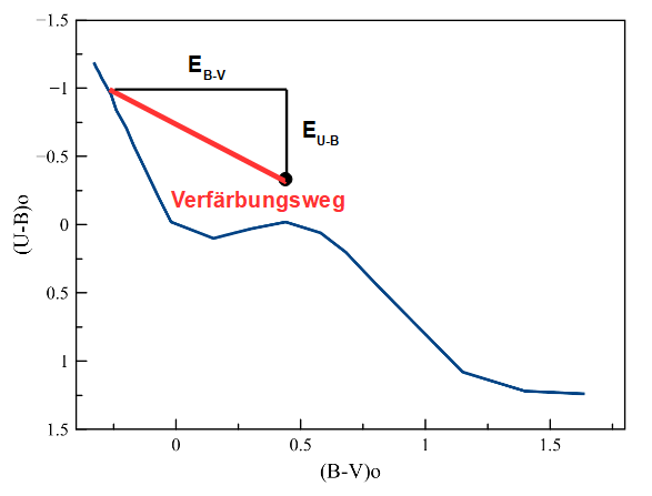 Bestimmung der interstellaren Verfärbung im Zwei-Farben-Diagramm. Die Kurve zeigt die Eigenfarben für Hauptreihensterne nach Schmidt-Kaler Th. in: Landolt-Börnstein, Zahlenwerte und Funktionen aus Naturwissenschaften und Technik, Gruppe VI Astronomie, Astrophysik und Weltraumforschung, Springer, Berlin, Heidelberg, New York, Band 2b, S.18, 1982.